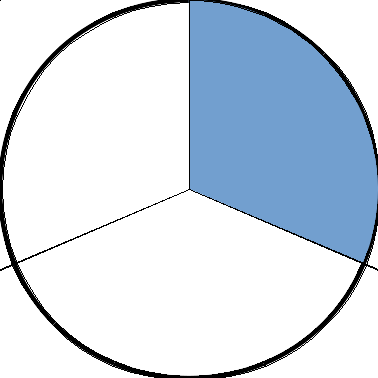 un terzo 1/3